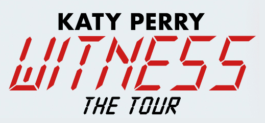 Logotipo, inspirado en el original, de la gira de Katy Perry: Witness The Tour.